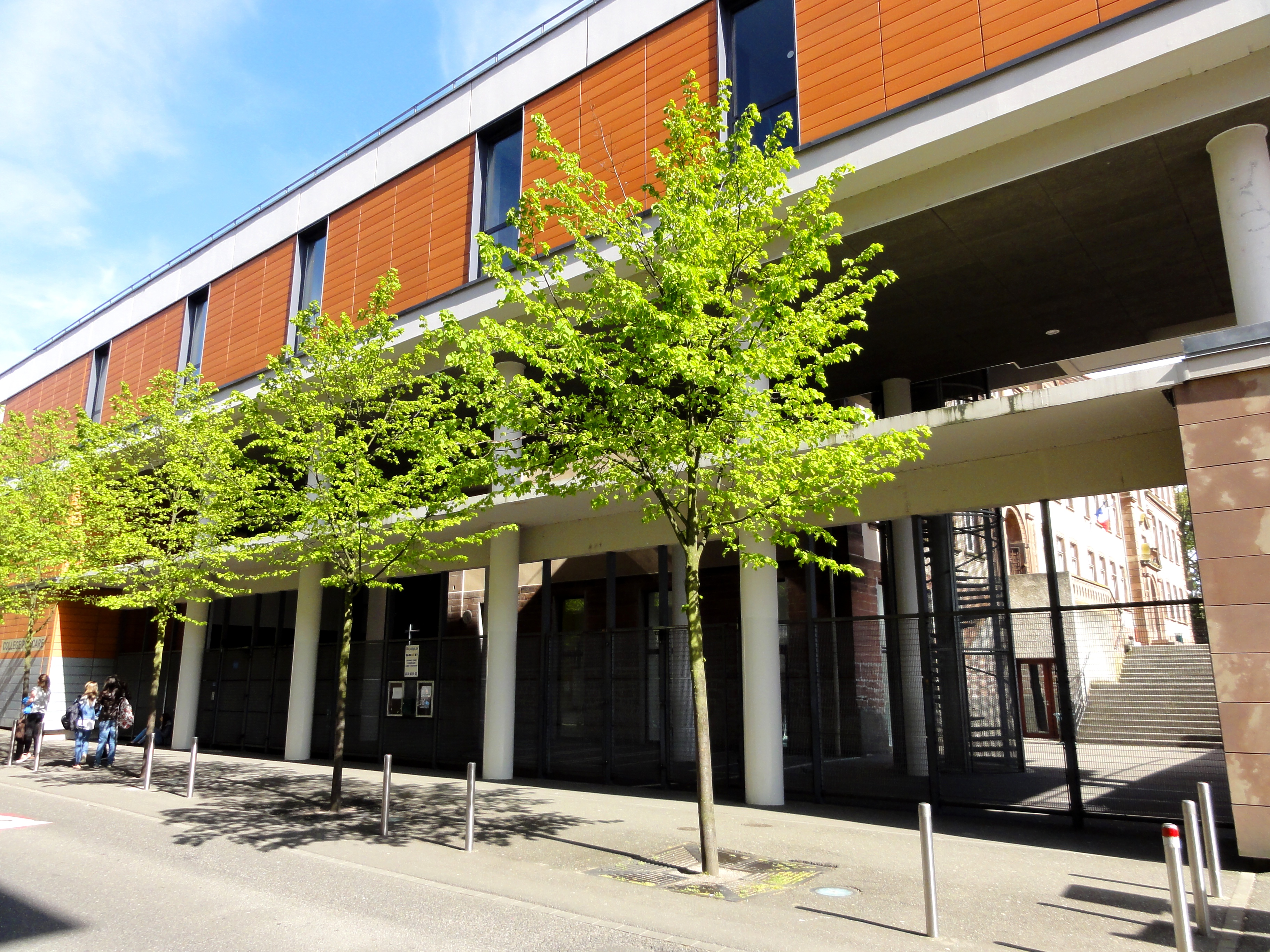 Alsace, Bas-Rhin, Saverne, Collège Poincaré, 17 rue Poincaré